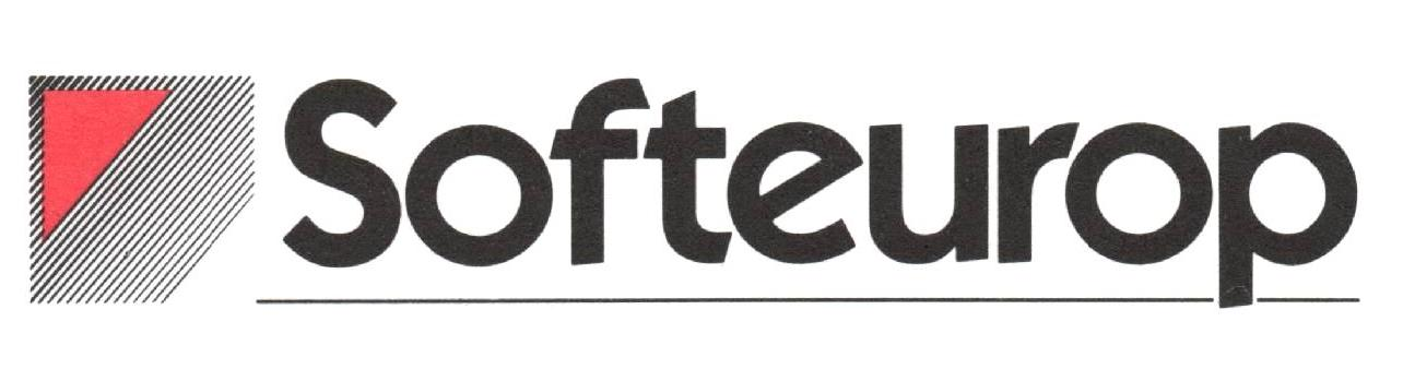 logo de la firme Softeurop (approx 1986-1989) grossiste-distributeur de matériel et logiciels micro-informatique en Belgique, France et Pays-Bas.